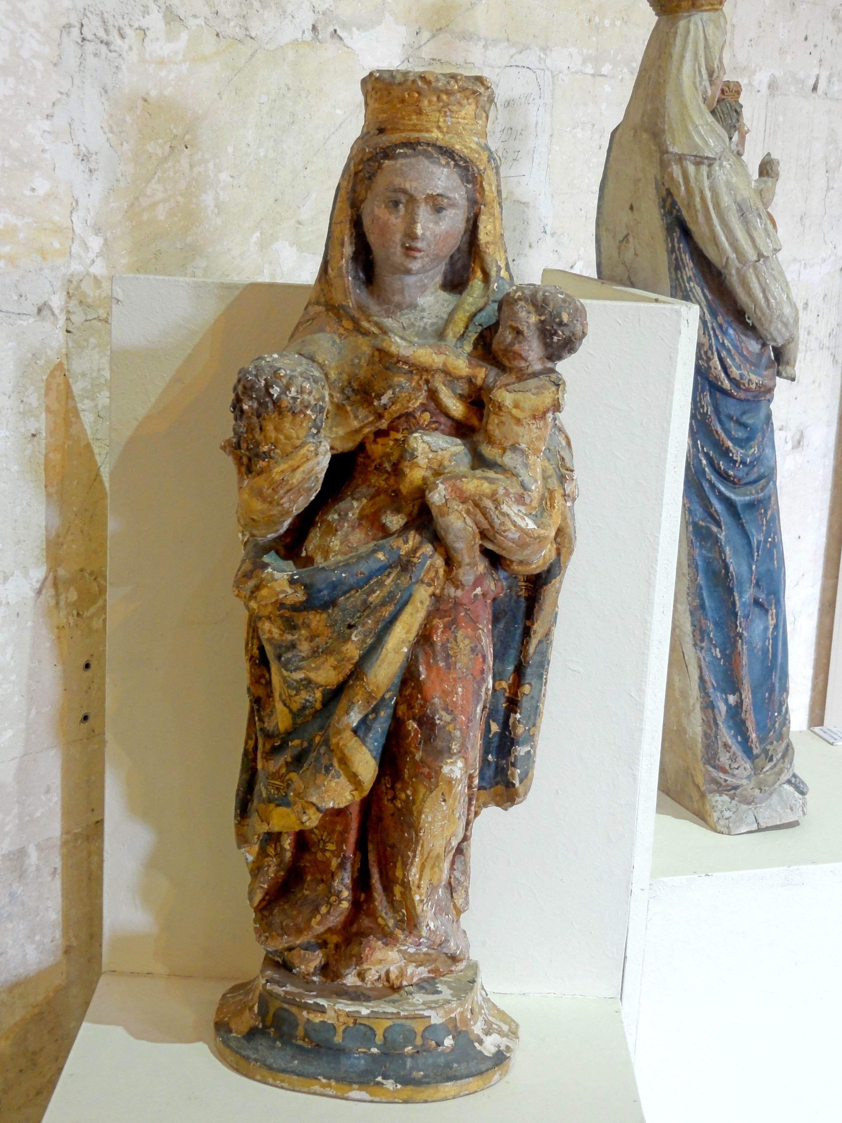 Vierge à l'Enfant, XVIe s.